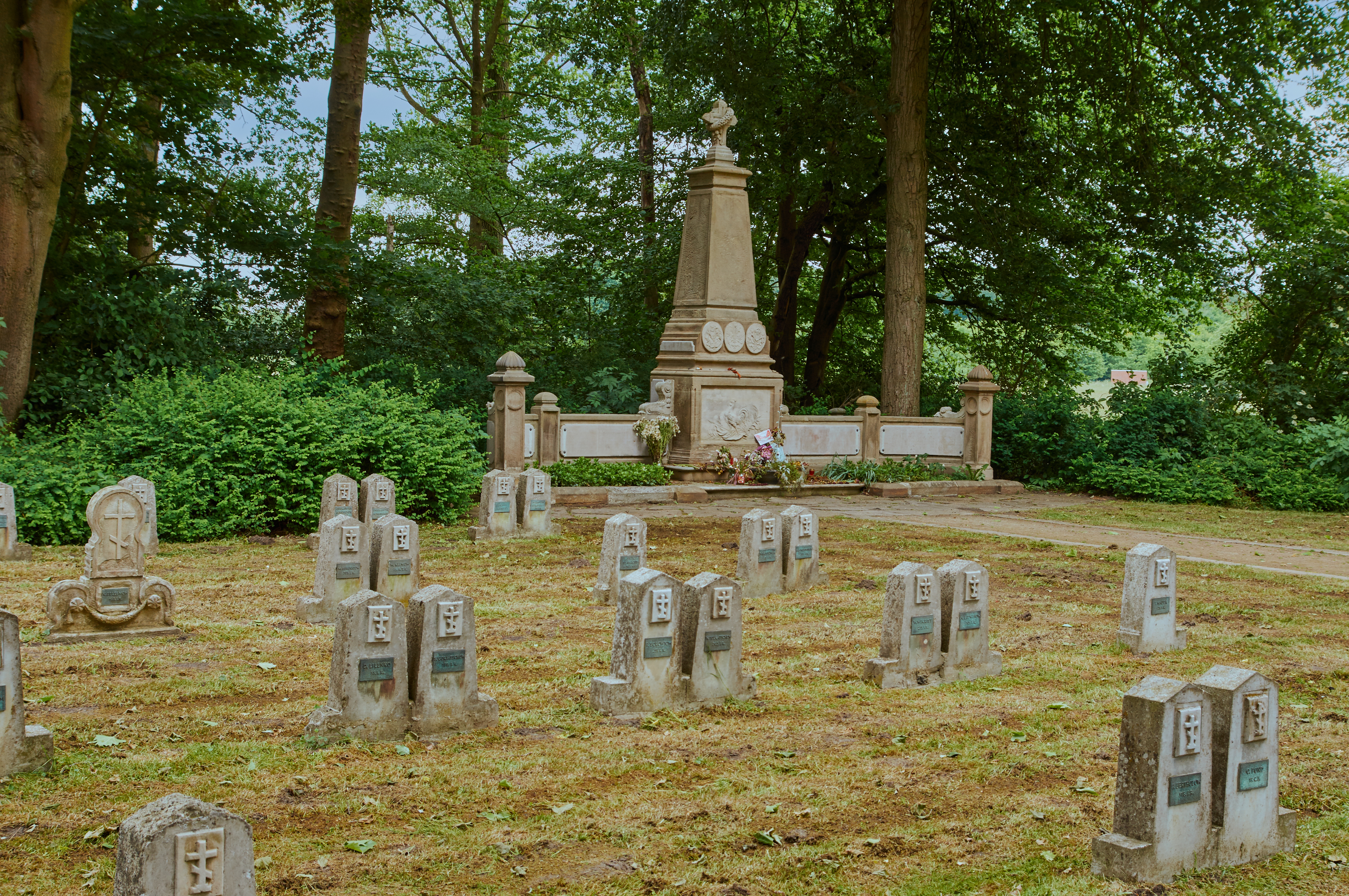 Die Kriegsgräberstätte Haus Spital am Horstmarer Landweg ist ein Ehrenfriedhof bei Nienberge, Münster. This is a photograph of an architectural monument.It is on the list of cultural monuments of Münster (Westfalen)